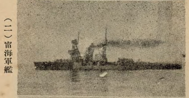 中文（中国大陆）: 中國新海軍插圖